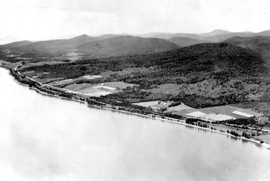 Village de Pointe-à-la-Garde, comté Bonaventure